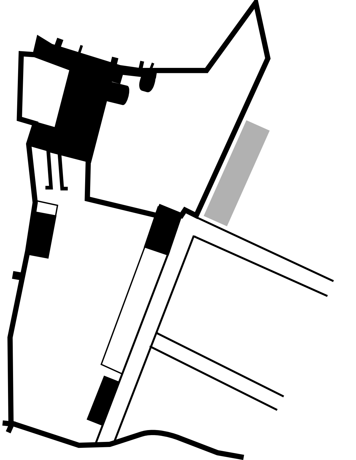 Plan zamku w Bodzentynie, niestety ze względu na skąpą dokumentację nie jest możliwe odtworzenie położenia poszczególnych pomieszczeń.